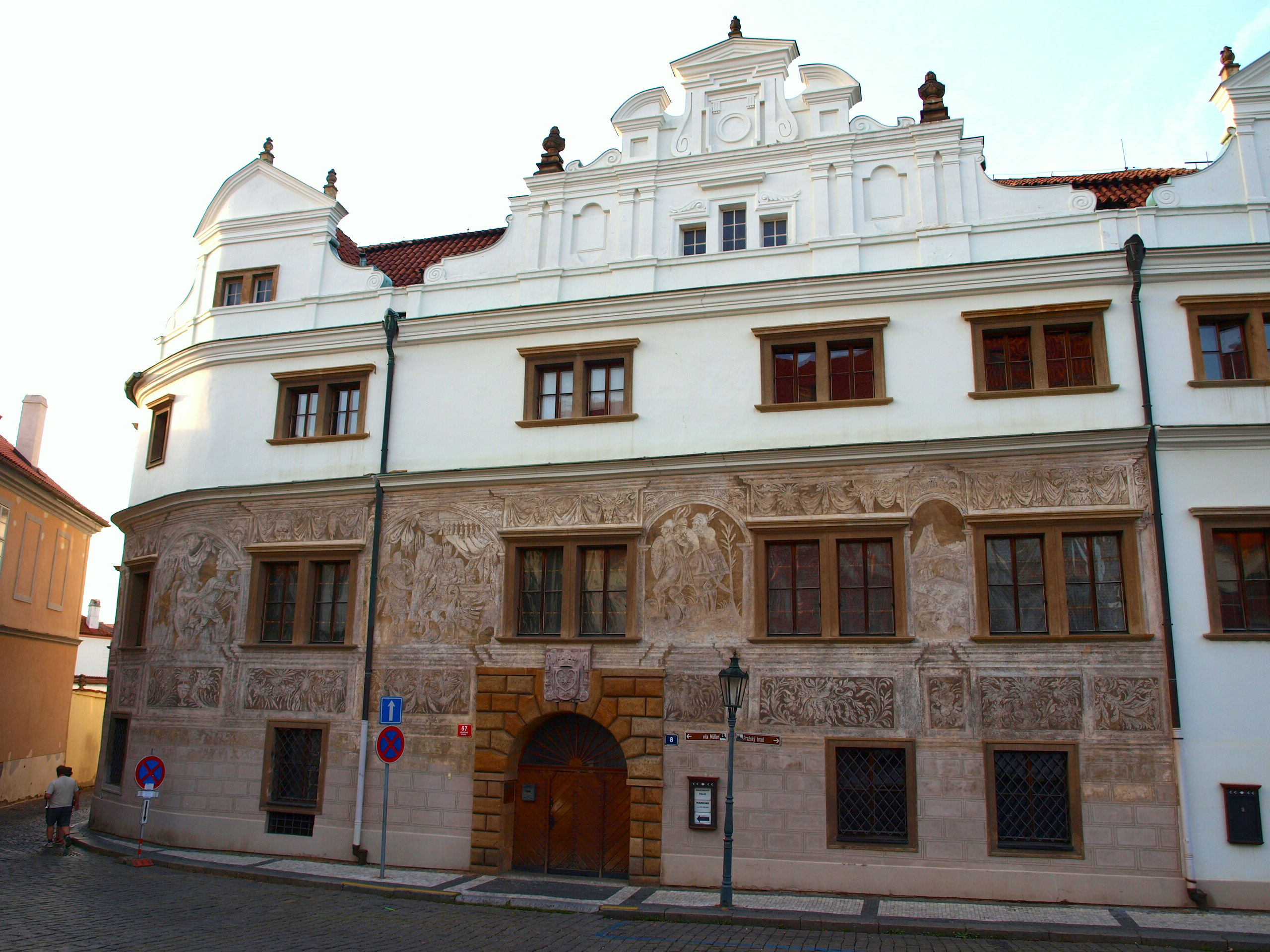 Martinický palác